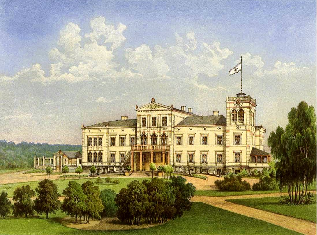 Schloss Gültz, Kreis Demmin